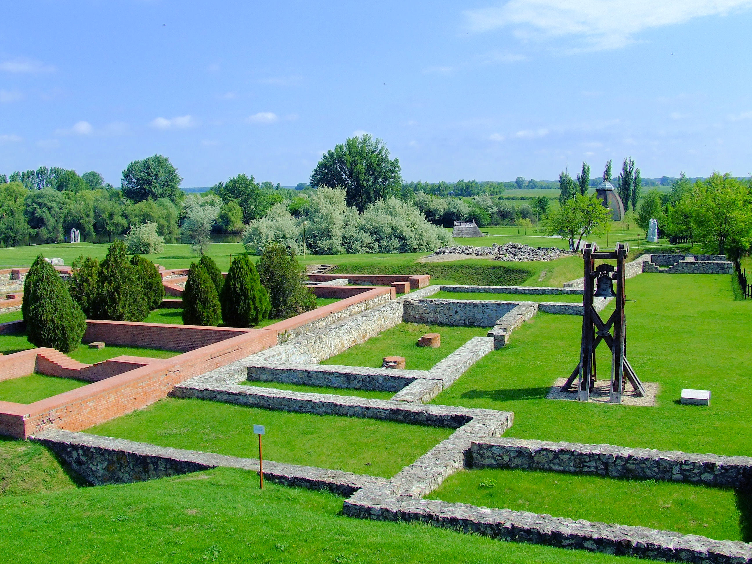 A romkert Ópusztaszeren